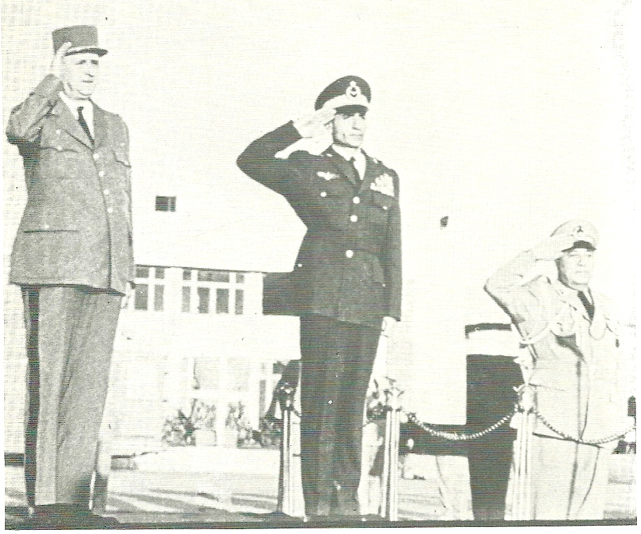 Lors de la visite officielle du General de Gaulle a Teheran